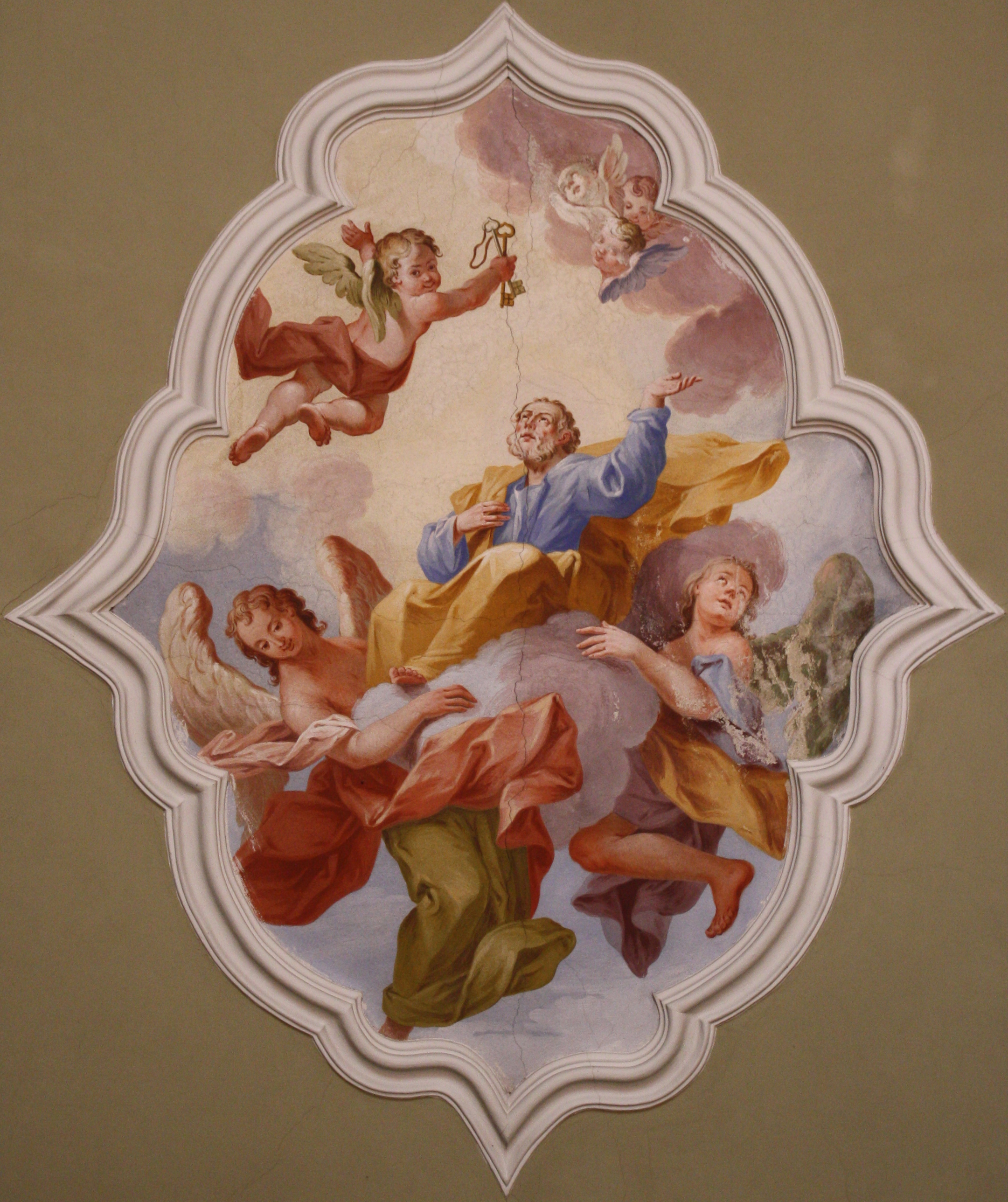 Affresco raffigurante la Gloria di San Pietro presso la chiesa di San Pietro a Cardano al Campo (VA).